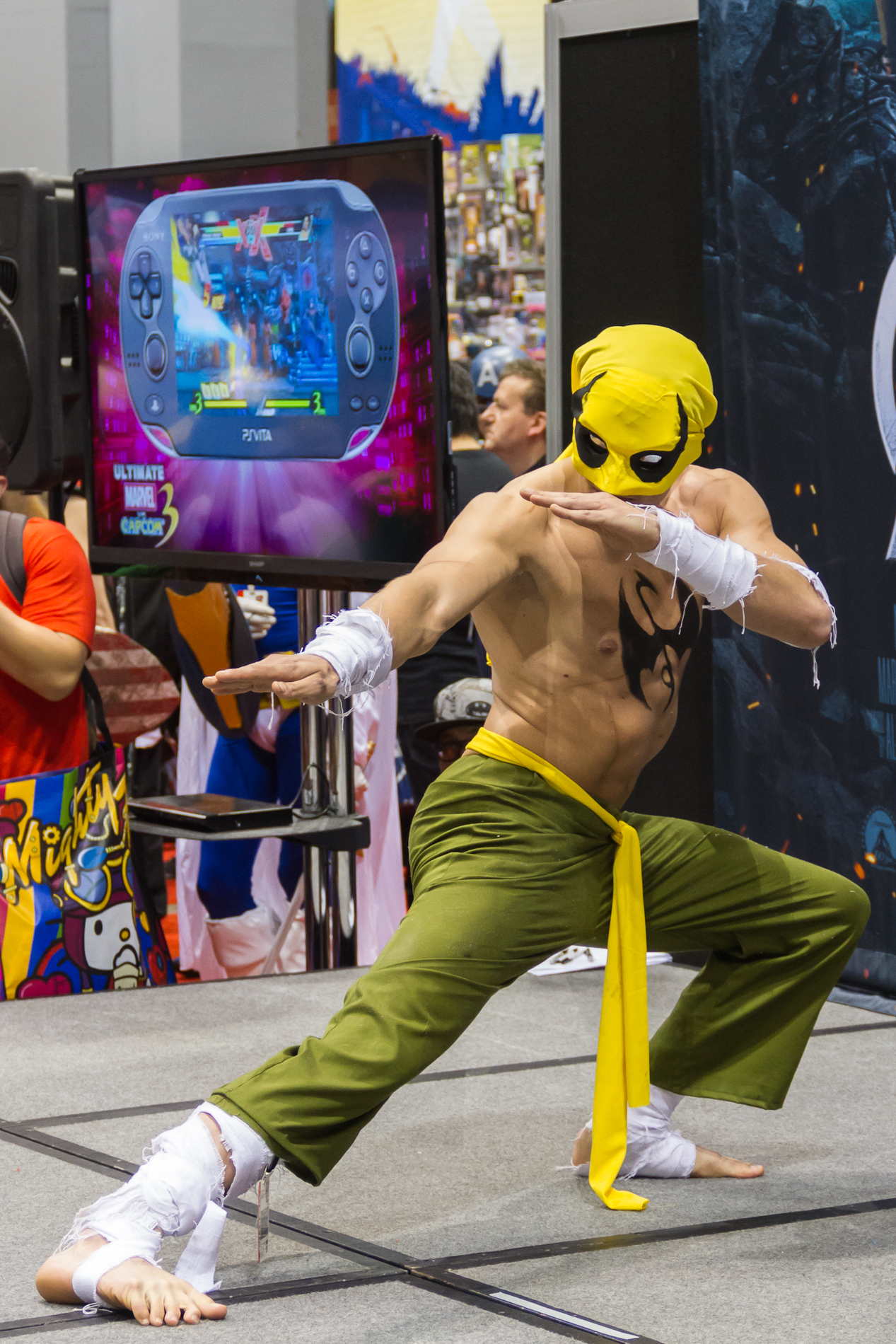 Disfressa del personatge de ficció Iron Fist. cosplay